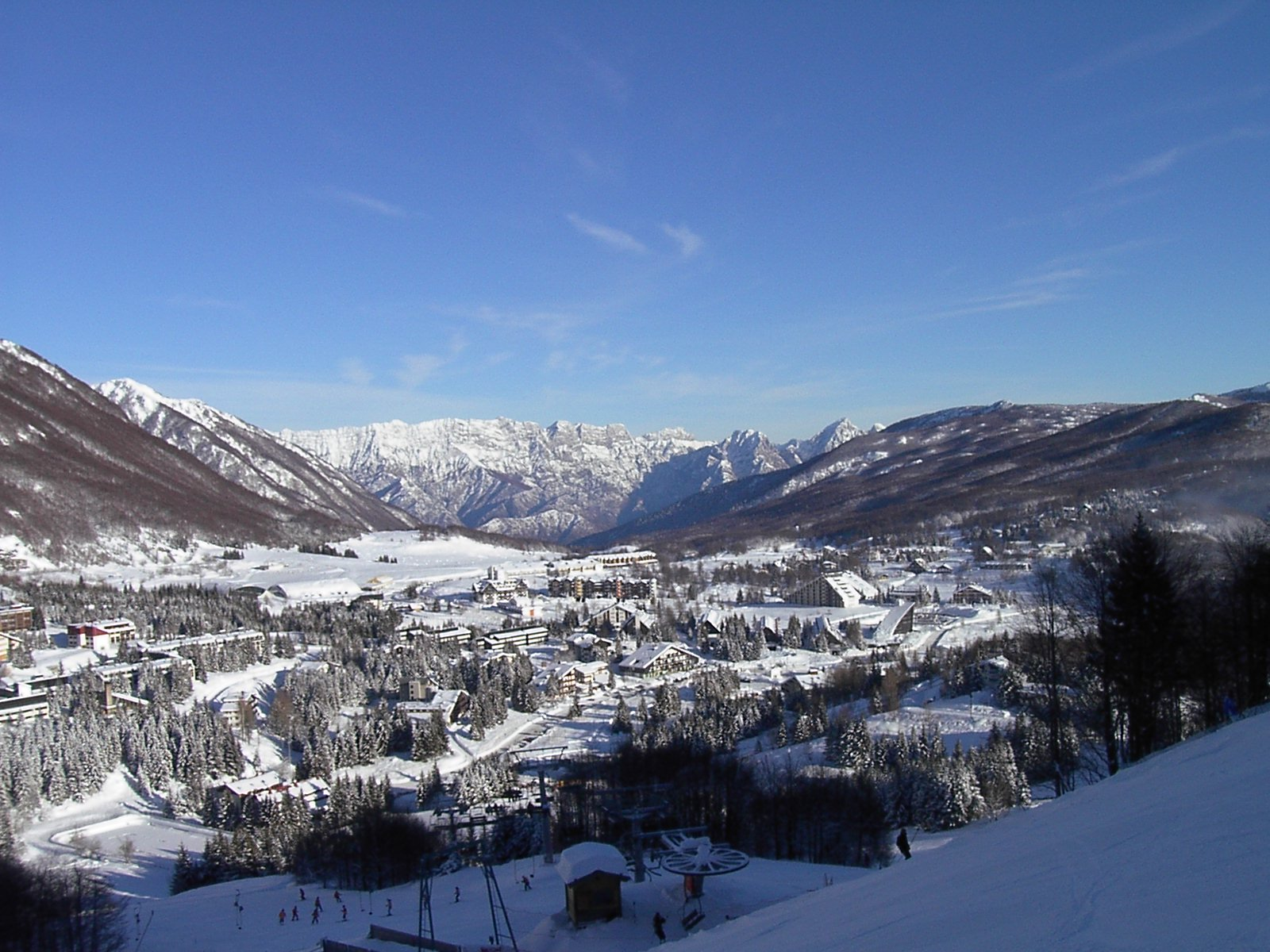 Panoramica dal Sauc